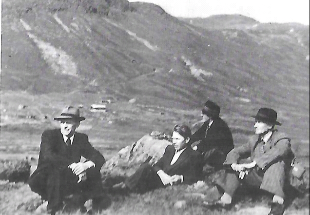 Olav Sataslåtten i fjellet